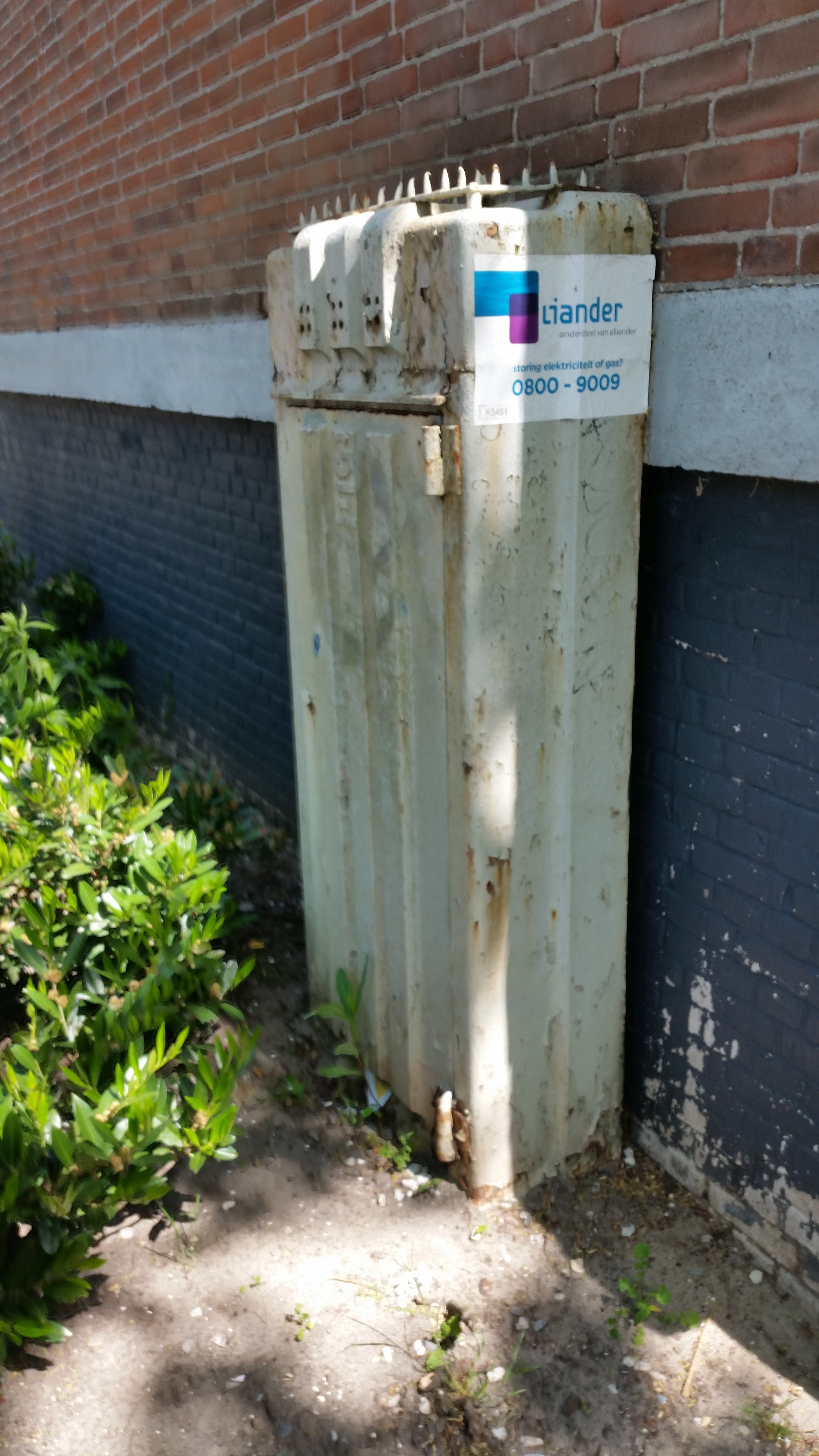 Impressie Van der Kunstraat, Amsterdam-Oost (mei 2020)